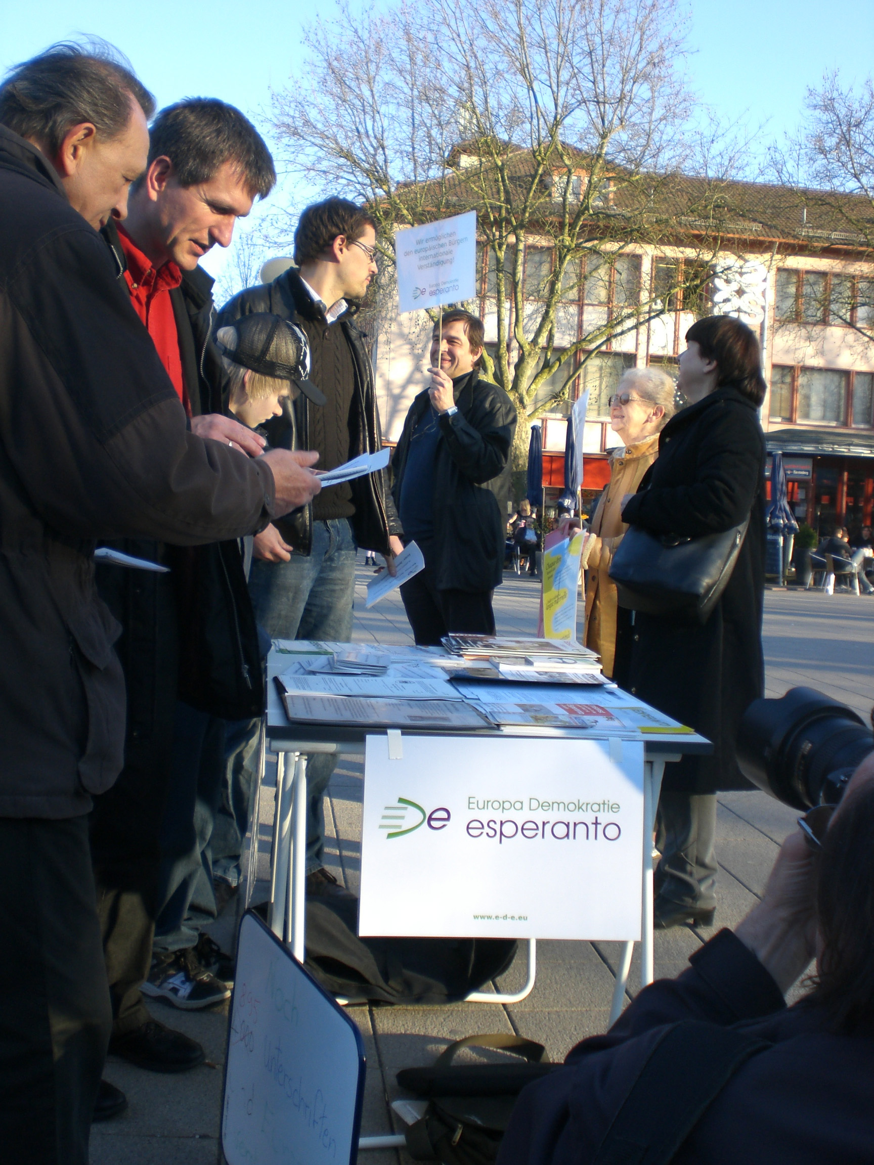 Informstando en Kehl kadre de la 1-a Internacia Konferenco de EDE en Strasburgo, 27.02.-01.03.2009